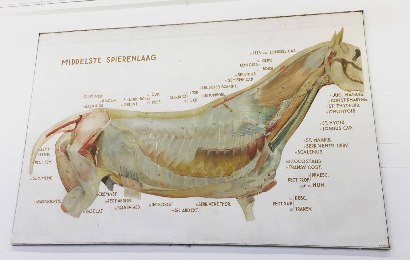 Schilderij Middelste spierenlaag van het paard door Karel de Bondt gemaakt in 1940.